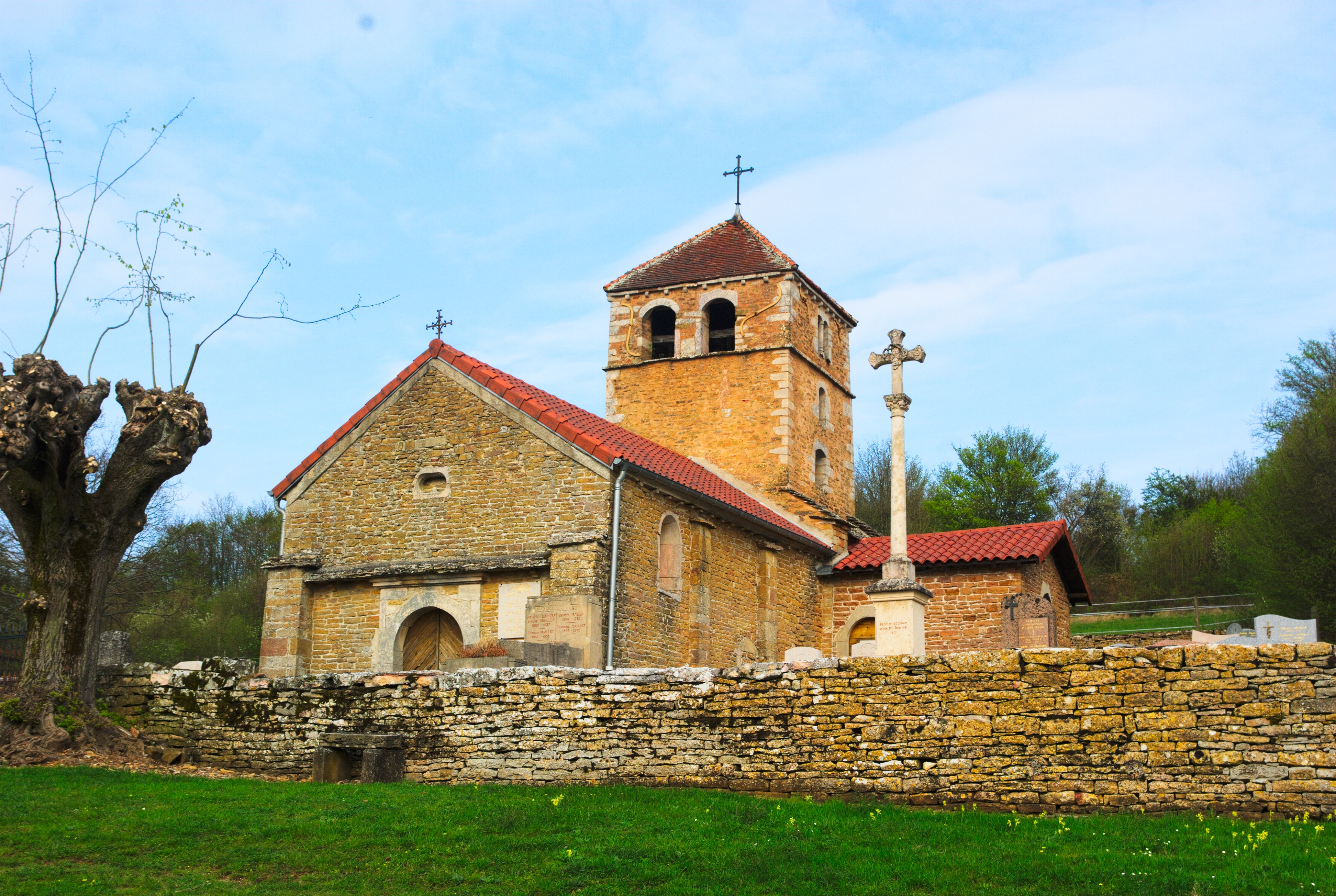 Église Saint-Martin de Grevilly